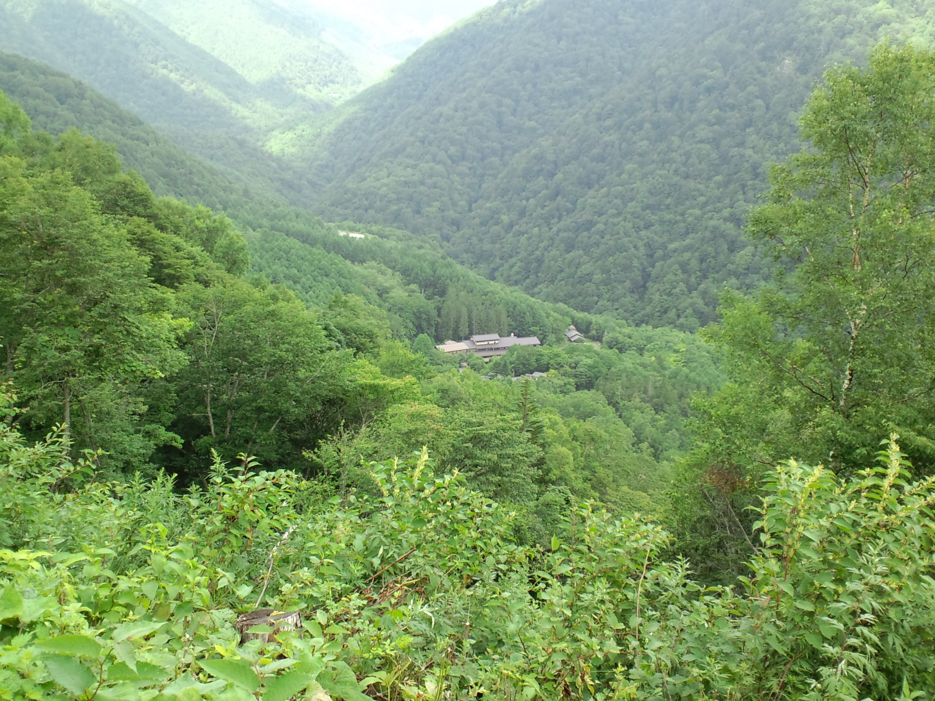 泡の湯旅館 Awanoyu at Shirahone Spa